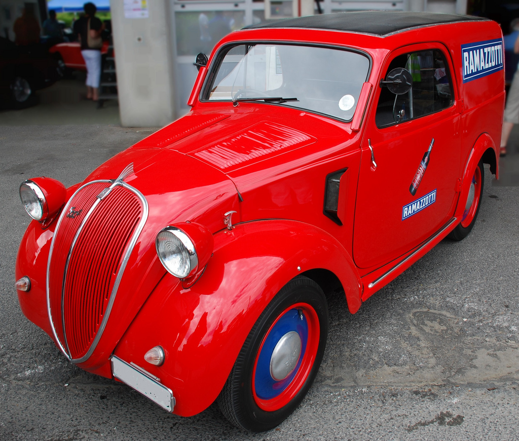 Ramazzotti - Van of delivery (Fiat); nice old Topolino